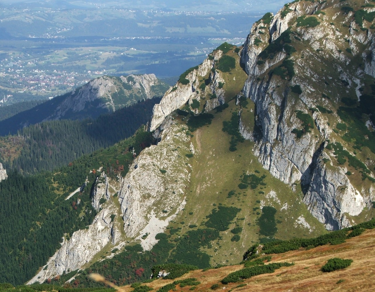 Zakończenie północno-zachodniej grani Małołączniaka w Tatrach i Siwarowa Przełęcz. W głębi Sarnia Skała